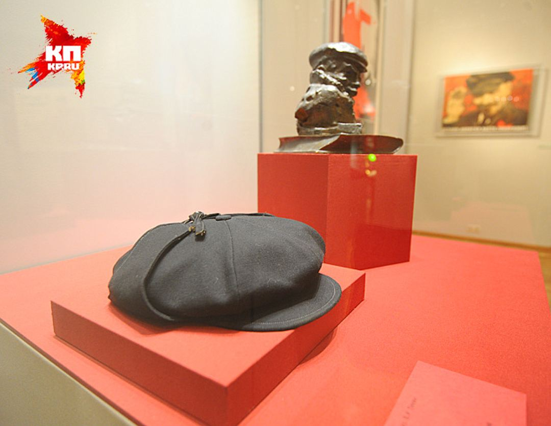 Кепка Леніна (не раней 1920 г., Дзяржаўны Гістарычны музей)